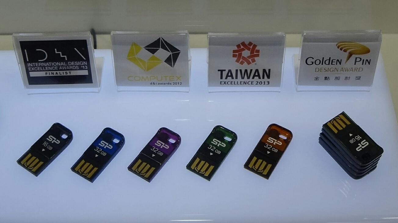 2013台北國際發明暨技術交易展展示的廣穎電通隨身碟Touch T02